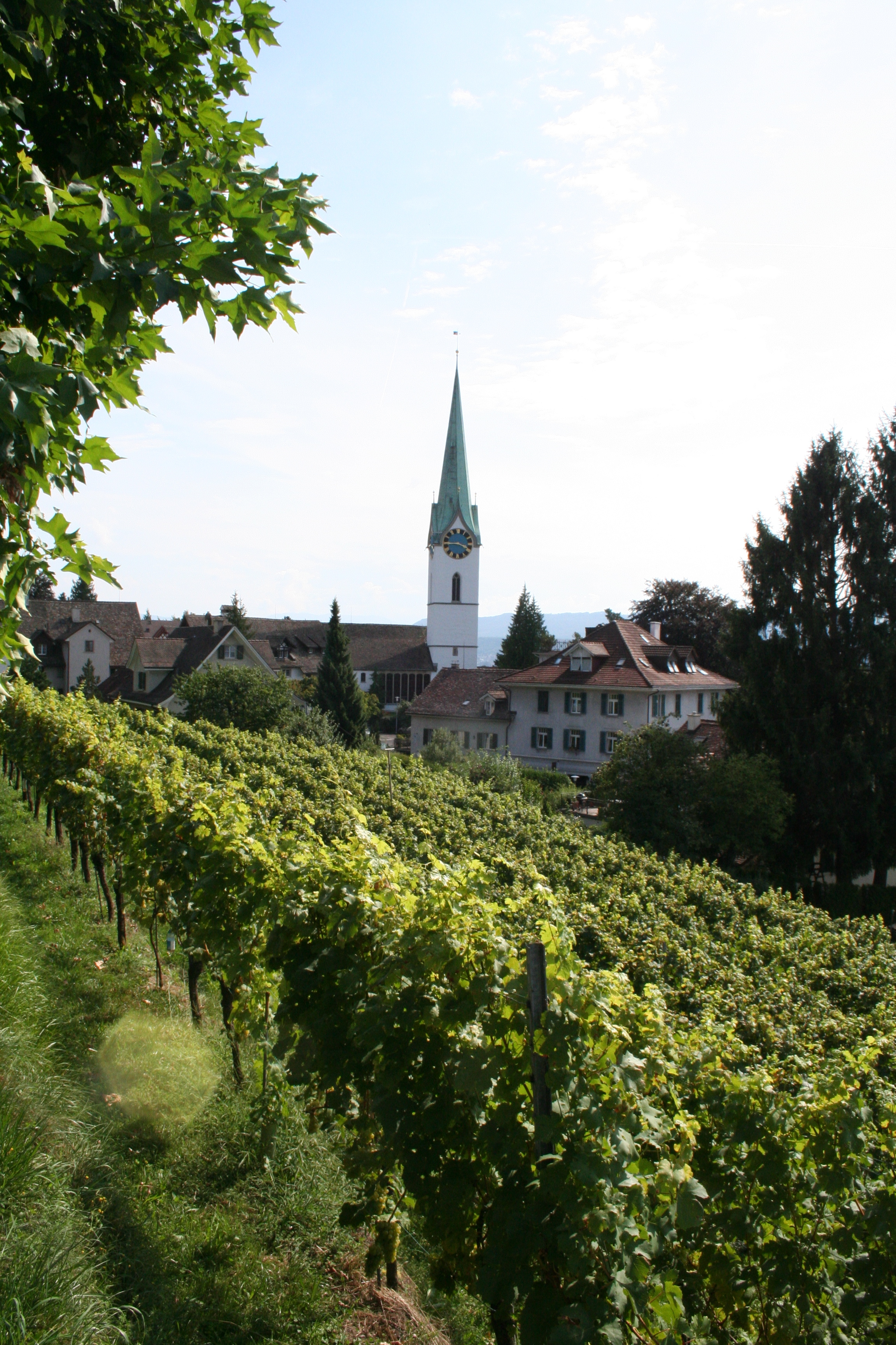 Rebberg vor der ref. Kirche Zollikon